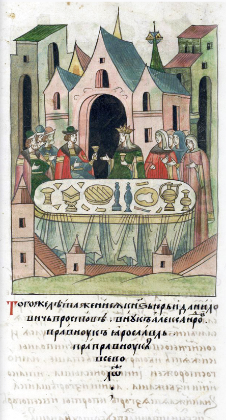 ЛИЦЕВОЙ ЛЕТОПИСНЫЙ СВОД В том же году женился князь Юрий Данилович в Ростове, внук Александров, правнук Ярославов, праправнук Всеволодов.